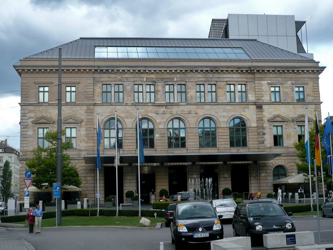 Ein Hotel der Sofitelkette. Bayerstraße in München am Hauptbahnhof.